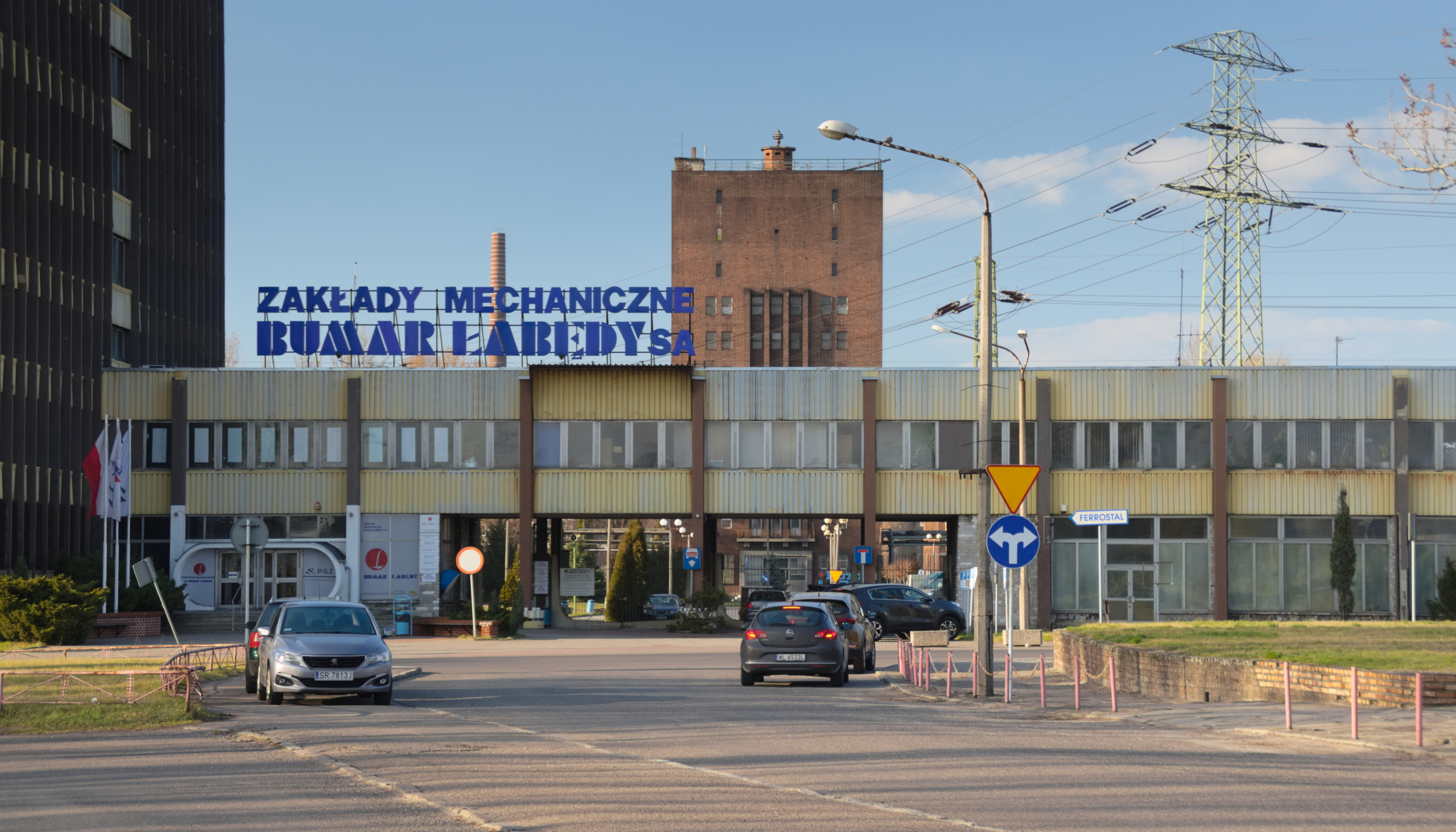 brama zakładów Bumar Łabędy w Gliwicach, w tle wieża ciśnień